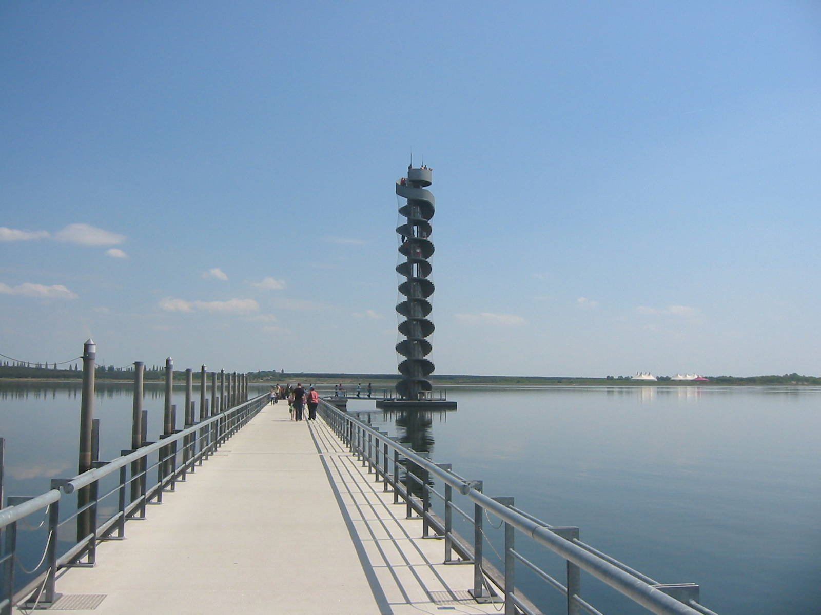 schwimmende Pontons als Zugang zum Pegelturm Goitzschesee in Bitterfeld-Wolfen